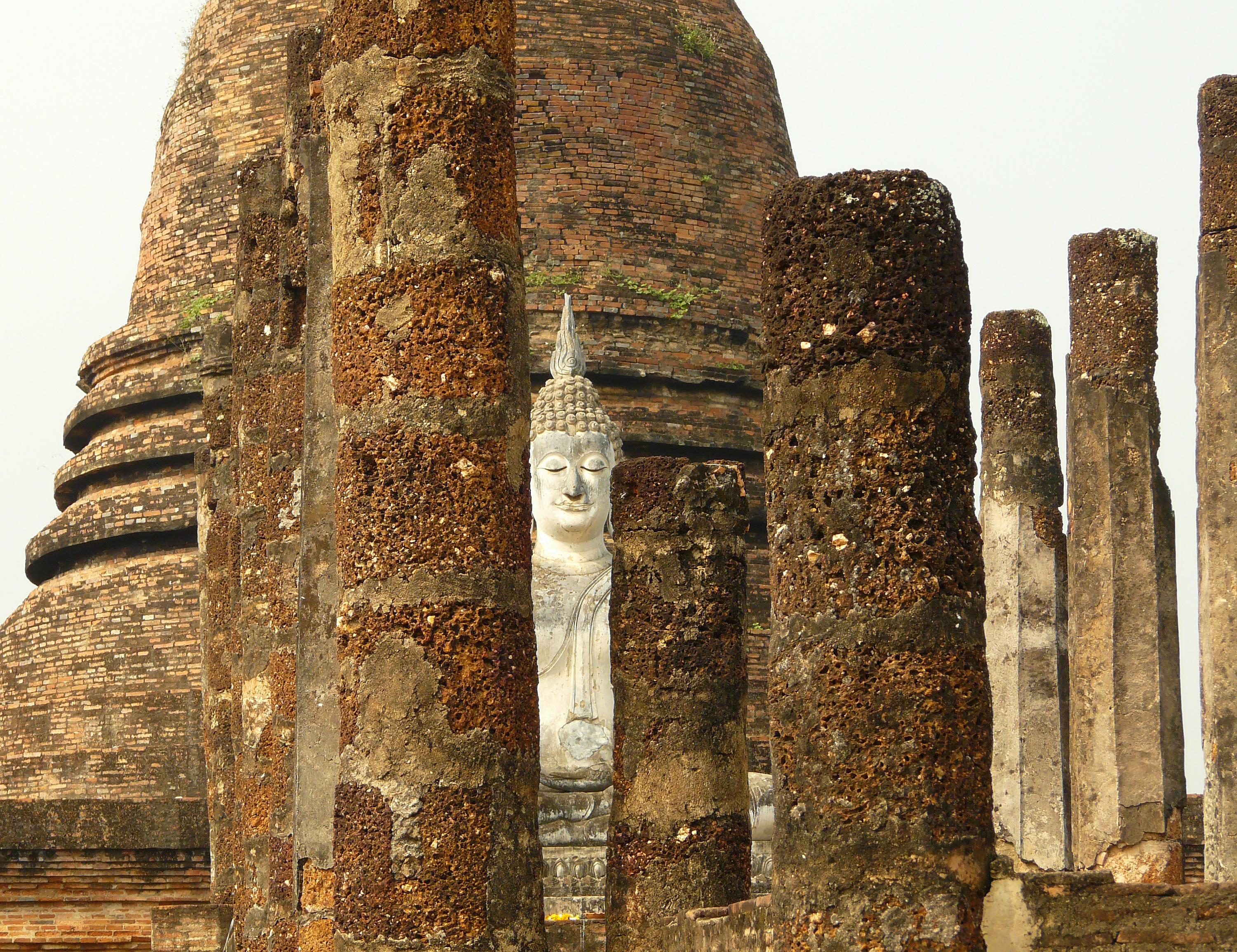 Ausschnittsaufnahme vom Wat Sa Si im Geschichtspark Sukhothai